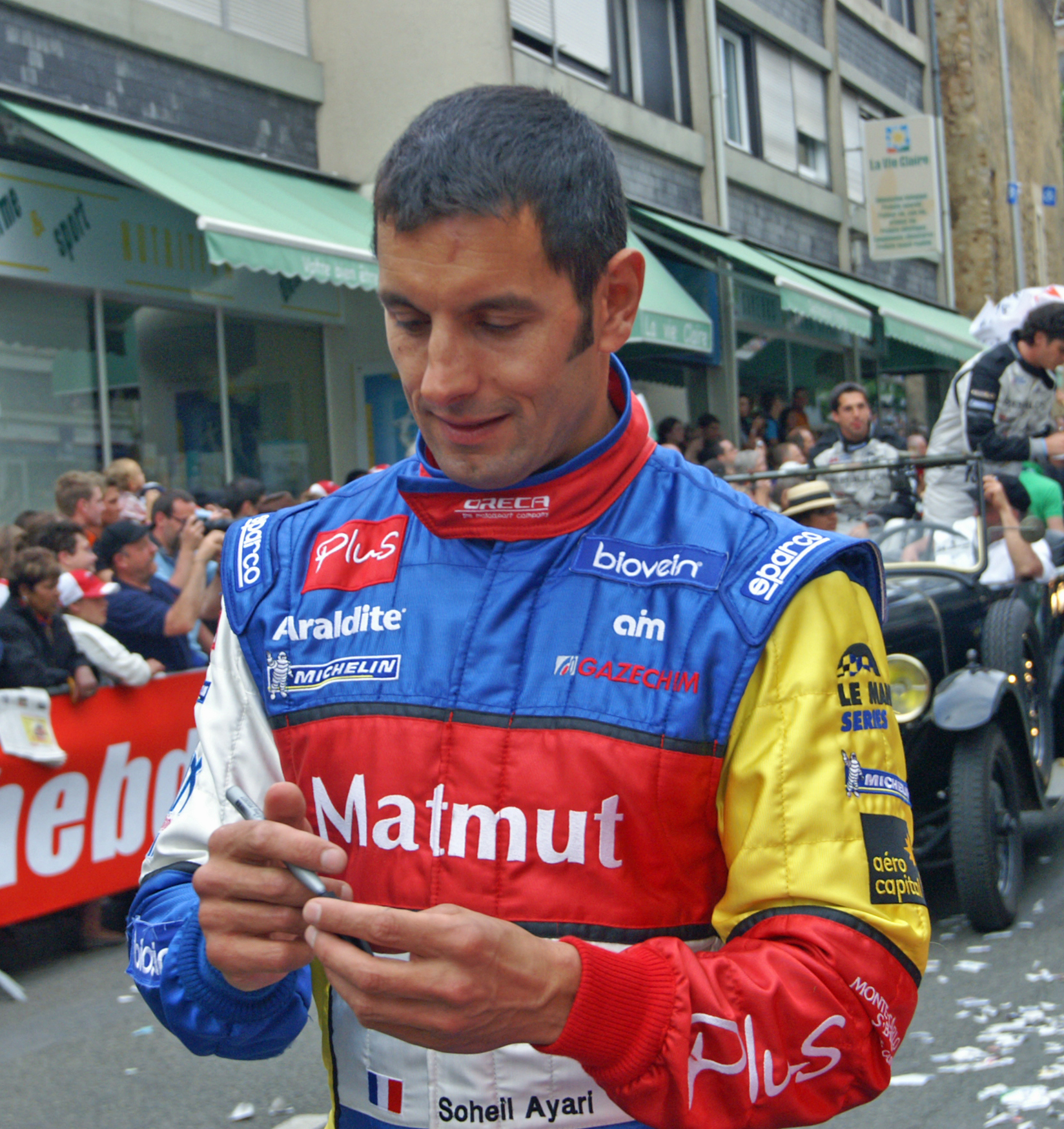 Soheil Ayari aux 24 heures du Mans 2009